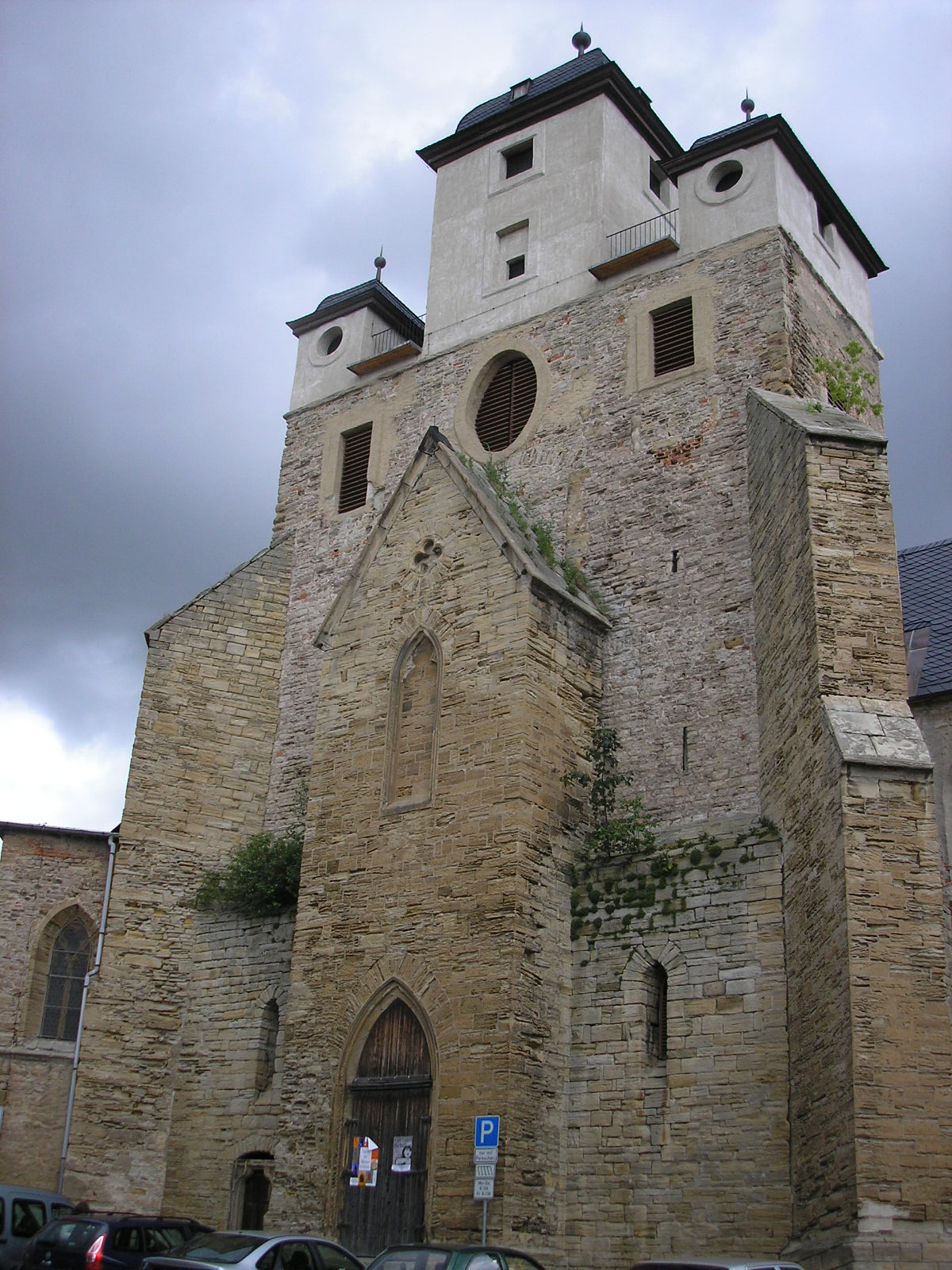 Frontansicht der Michaeliskirche in Zeitz.